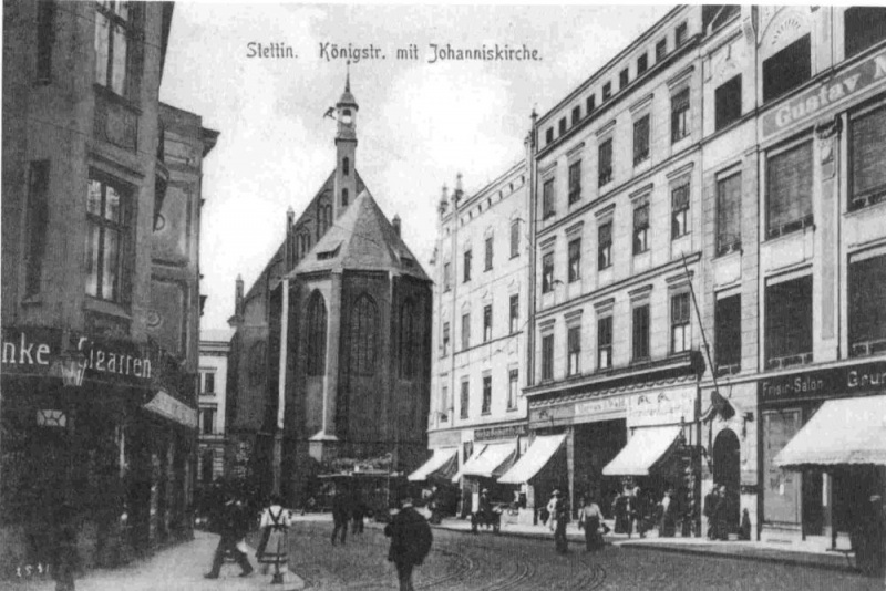 Königsstraße Stettin-1903